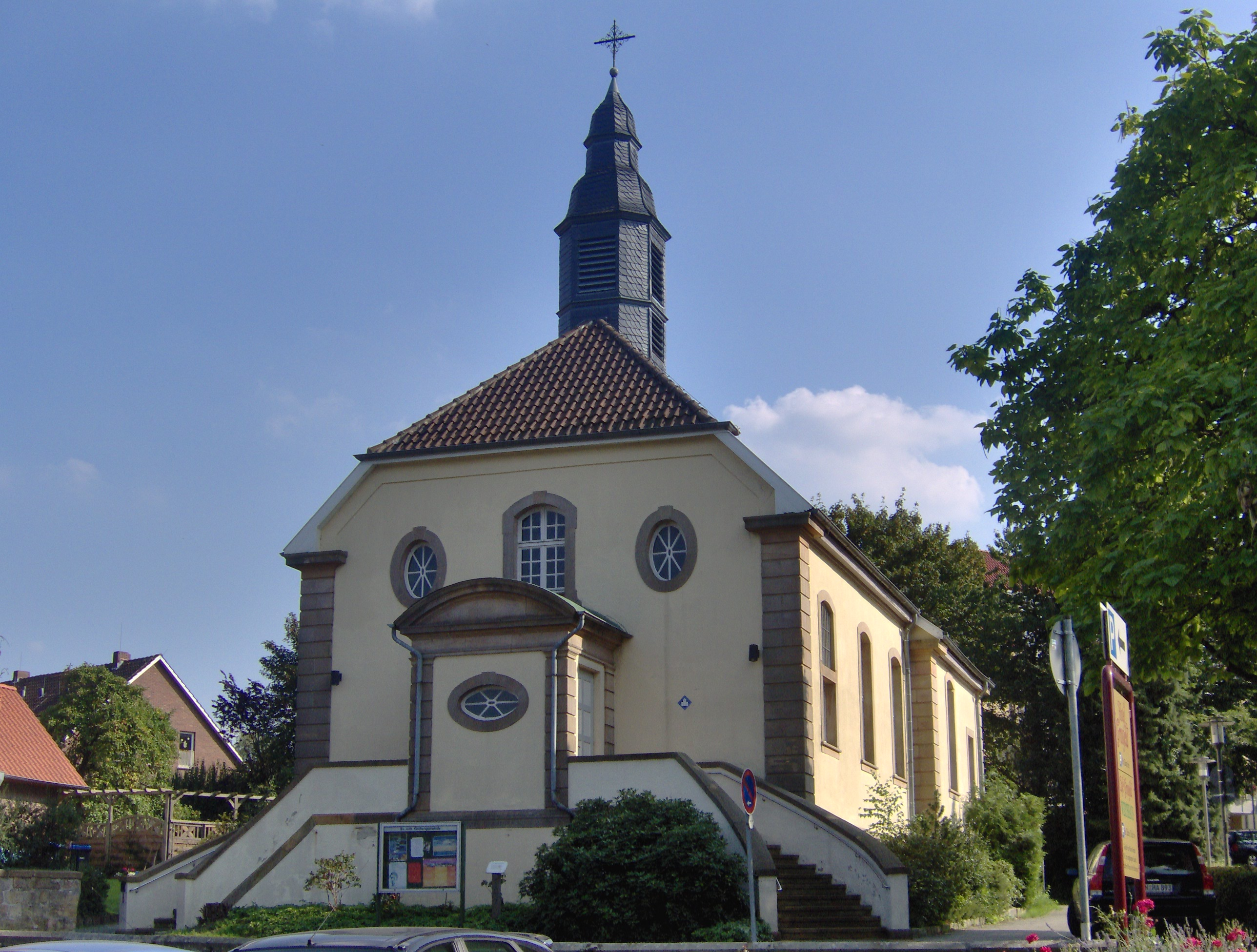 Evangelsich-lutherische Kirche, Schüttorfer Straße 2 in Bad Bentheim in Lower Saxony, Germany